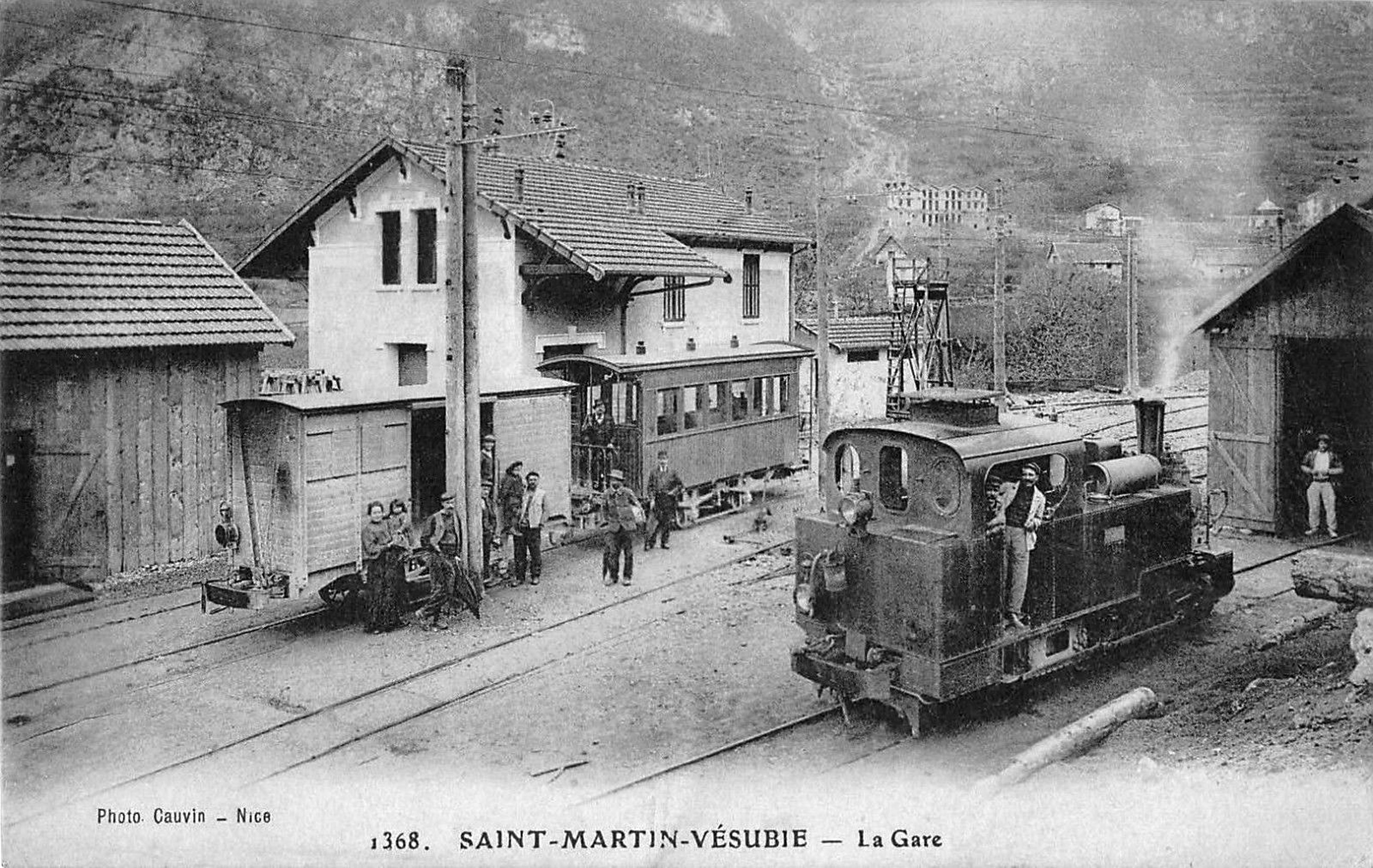 Saint Martin Vesubie